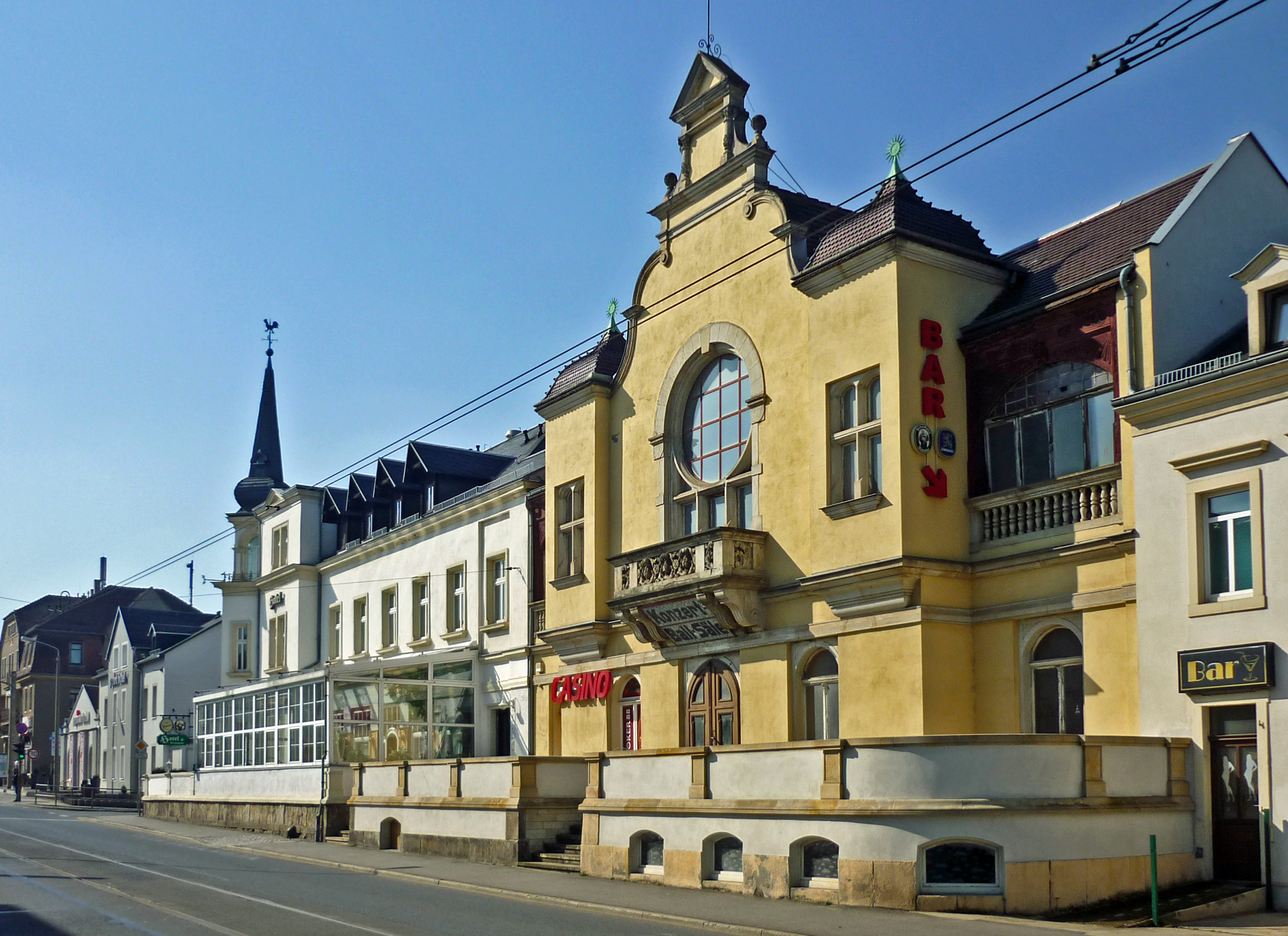 Kurhaus in Dresden-Klotzsche, Königsbrücker Landstr.